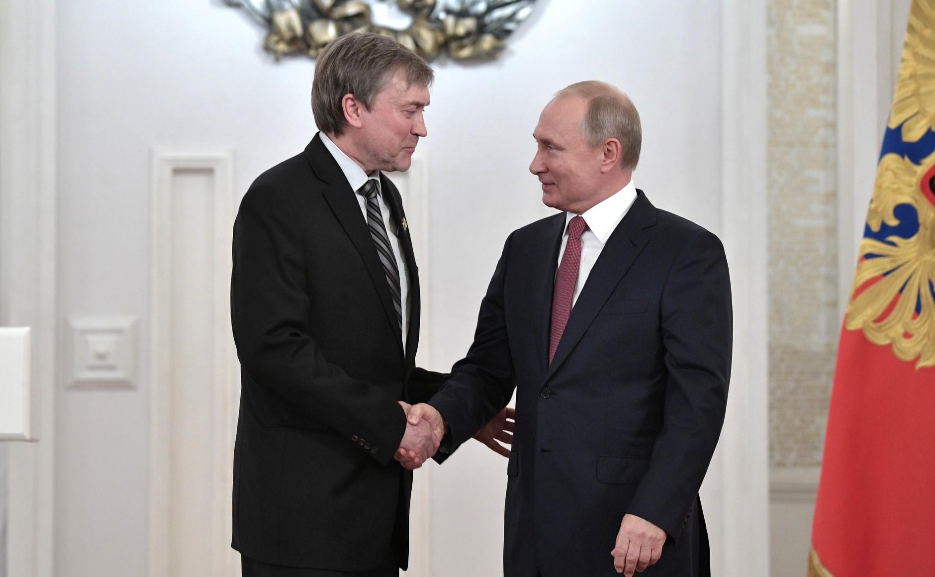 Церемония вручения государственных наград.